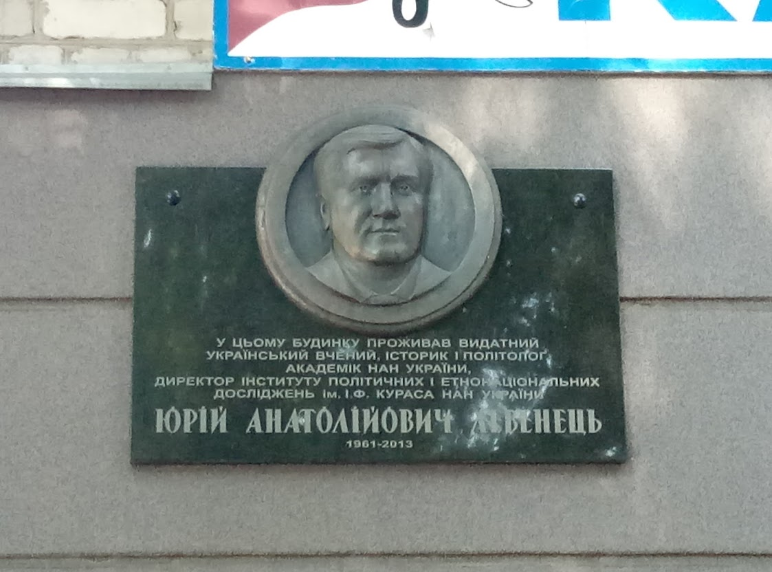 Пам'ятна дошка Левенцю Юрію Анаталійовичу у Кременчуці на фасаді будинку по вул. Майора Борищака буд. 6/20, де проживав у шкільні роки